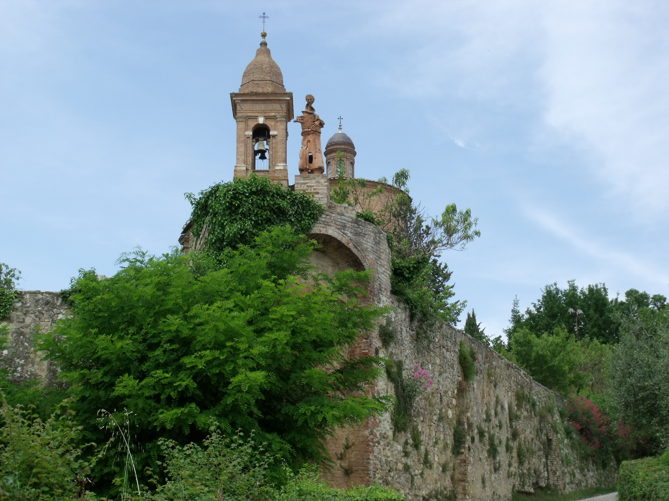 Basilica dell’Osservanza, Siena, von Süden fotografiert, alter Eingang, von der Stadt kommend